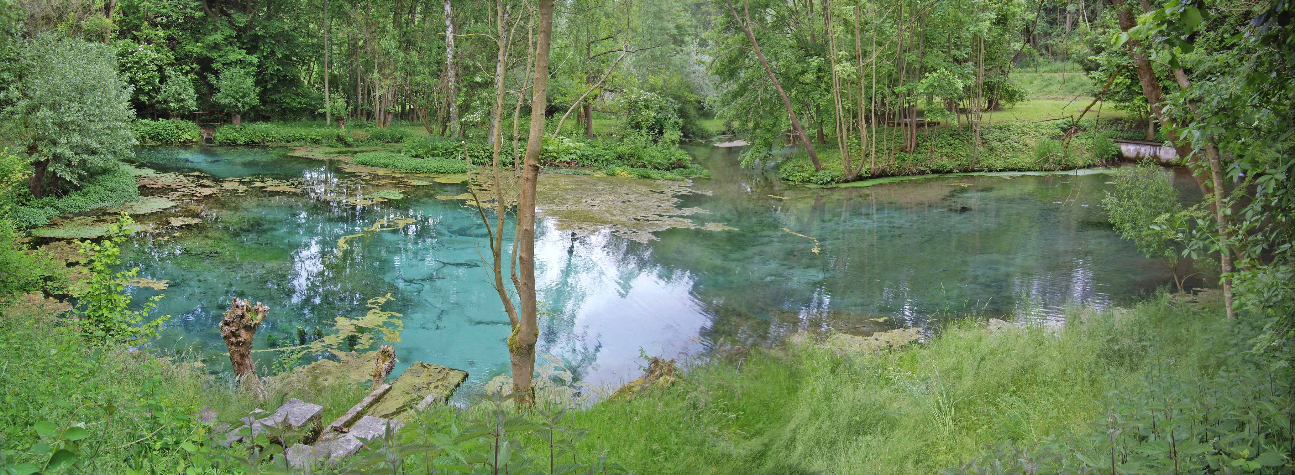 Grone-Quelle (Gronespring), Blick von der Westseite. In der Bildmitte im Hintergrund der Ausfluss der Grone.